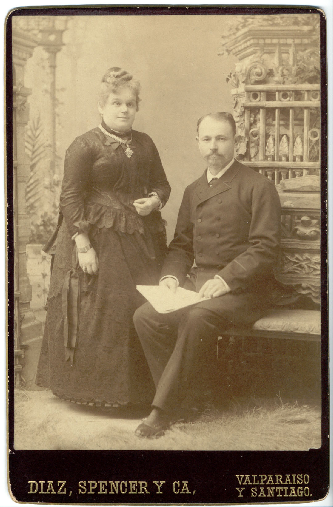 Andres Ebner Anzenhofer (1850-1905) y Caroline Bielefeld Kaiser(1851-1925) Licensing Esta imagen ha sido copiada del álbum familiar de Armin Ebner, quien es su autor y la ha cedido para uso publico en concordancia con la licencia descrita abajo.